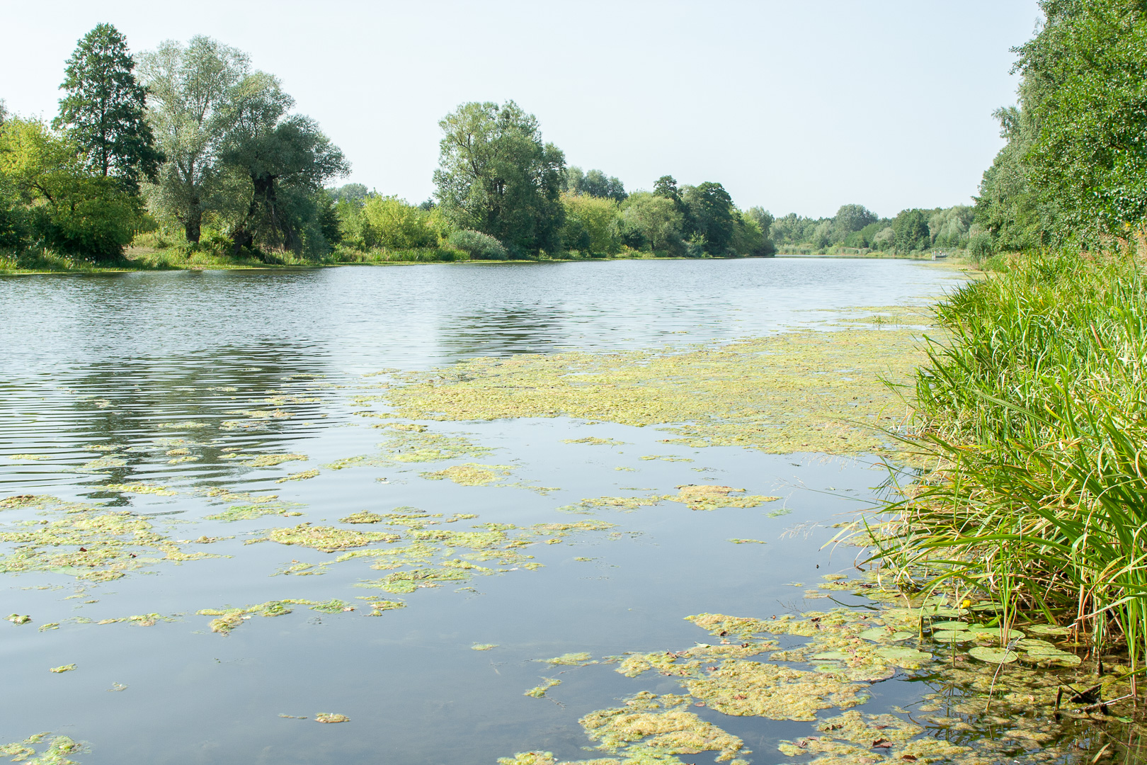 Starorzecze Wisły Jeziorko Łacha Nowowiejska (Jeziorko / Jezioro Łacha) na osiedlu Nowa Wieś w Józefowie k/Warszawy, z prawego brzegu w kierunku północnym. Widoczne są rozwijające się glony. This is a photography of Natura 2000 protected area with ID PLB140004